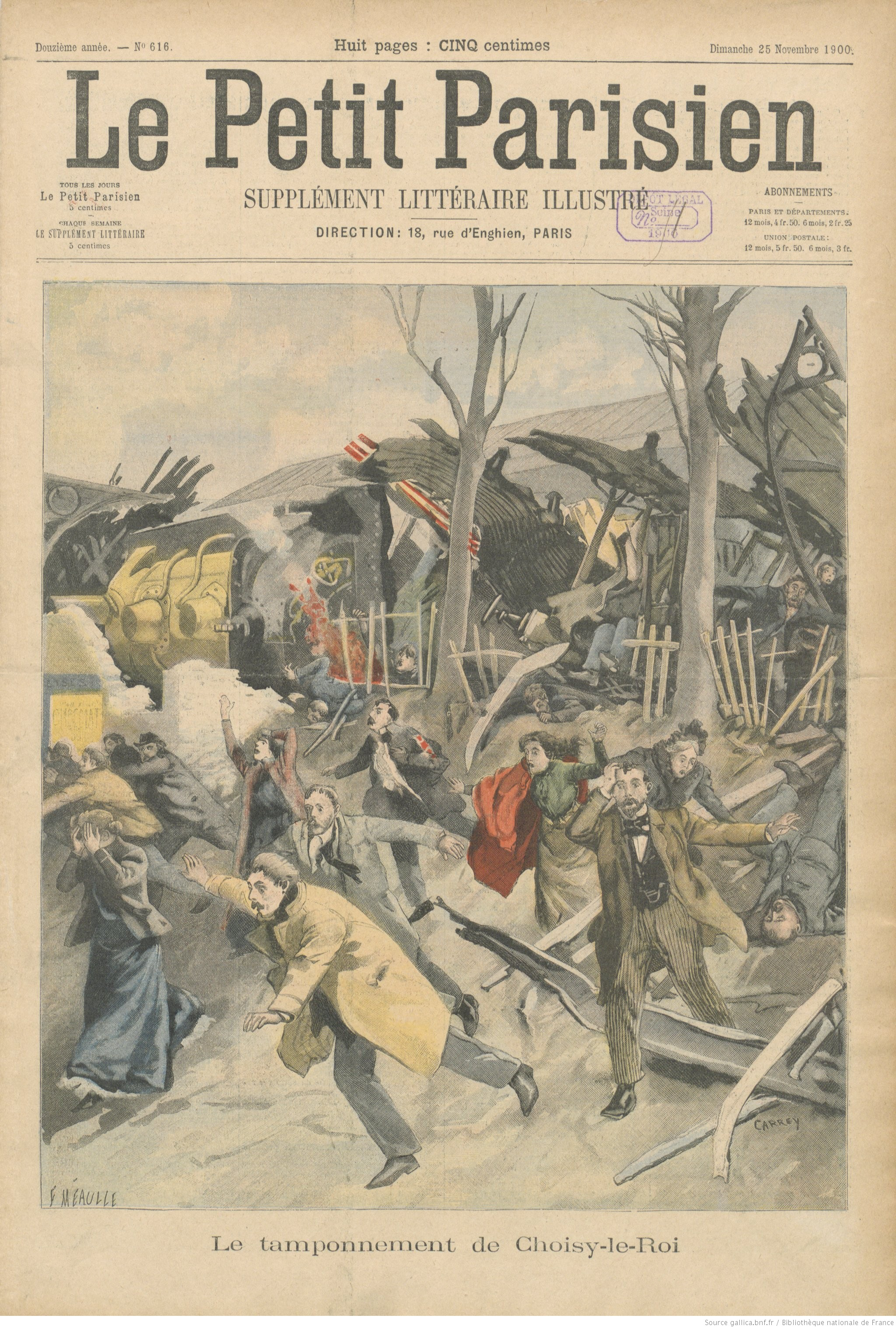 Le tamponnement de Choisy-le-Roi vu par les dessinateurs du Petit Parisien (numéro du 25 novembre 1900).